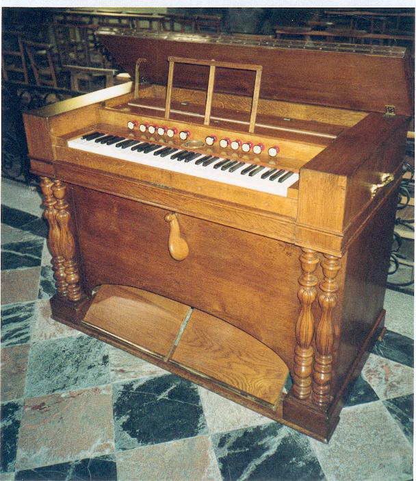 Harmonium français du facteur Alexandre-François Debain